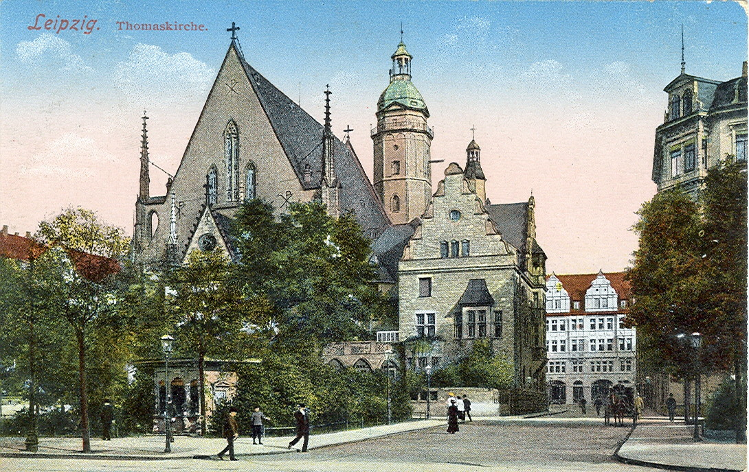 Postkarte, datiert 14.5.1918. Beschriftung: "Leipzig - Thomaskirche".